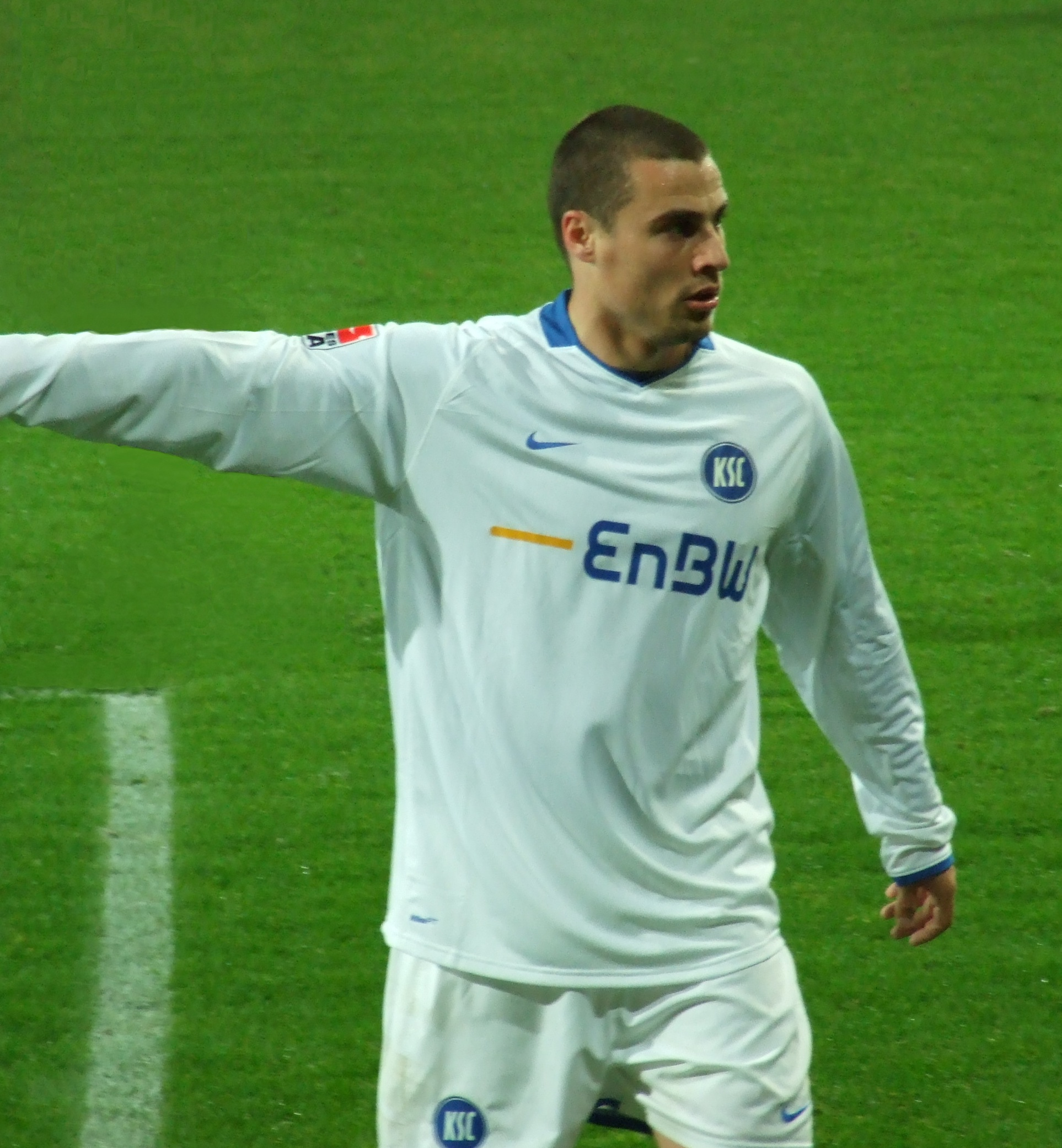 Timo Staffeldt beim Fußballspiel Alemannia Aachen - Karlsruher SC